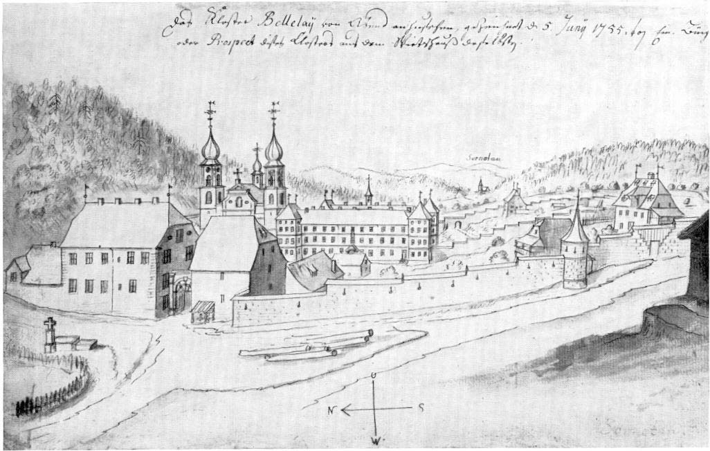 L'église et l'abbaye de Bellelay en Suisse, dessinées le 5 juin 1755 depuis l'auberge de l'Ours par Emmanuel Büchel